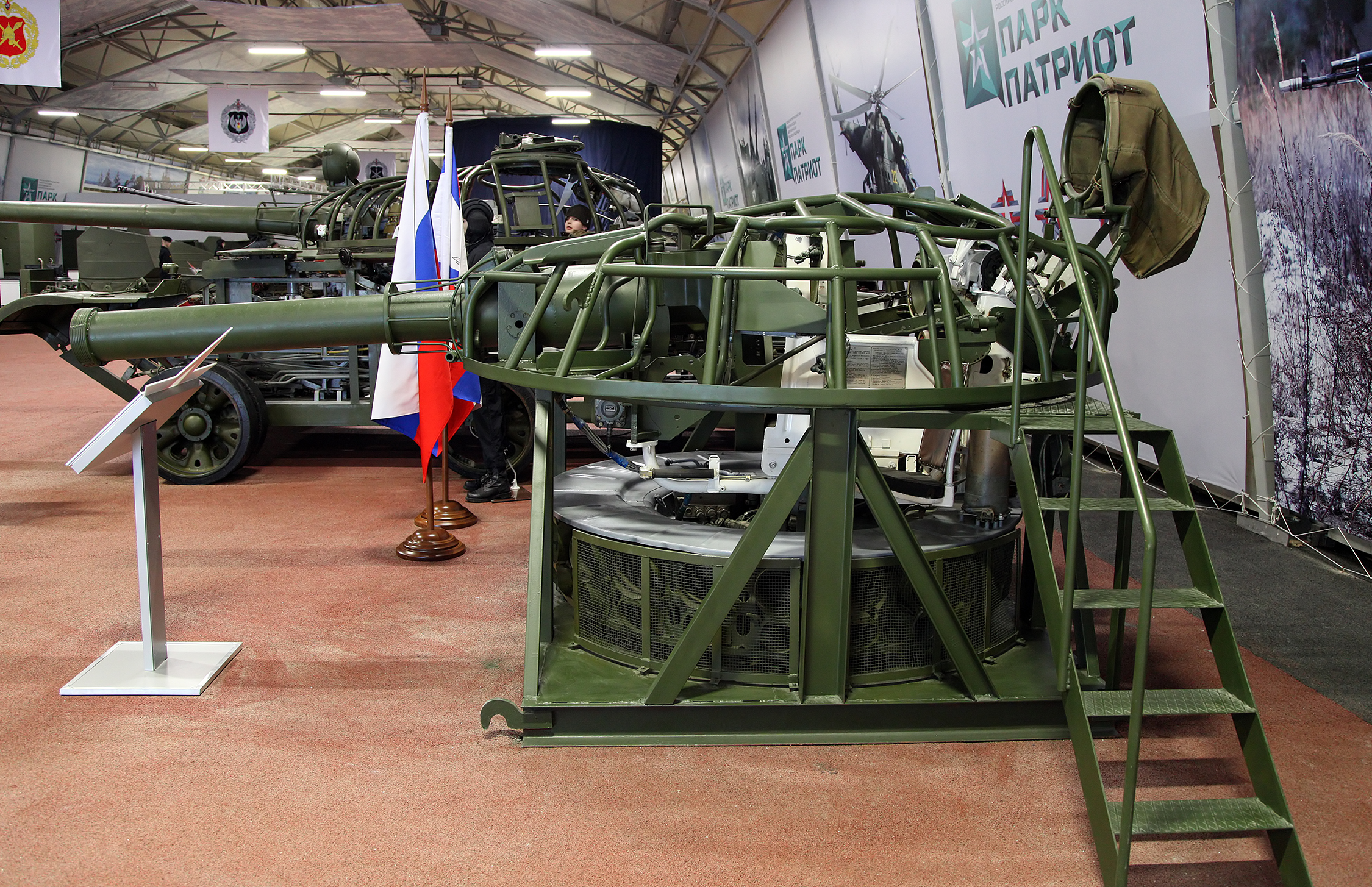 Стенд аппарата заряжания Т-72 (T-72 loader training simulator)